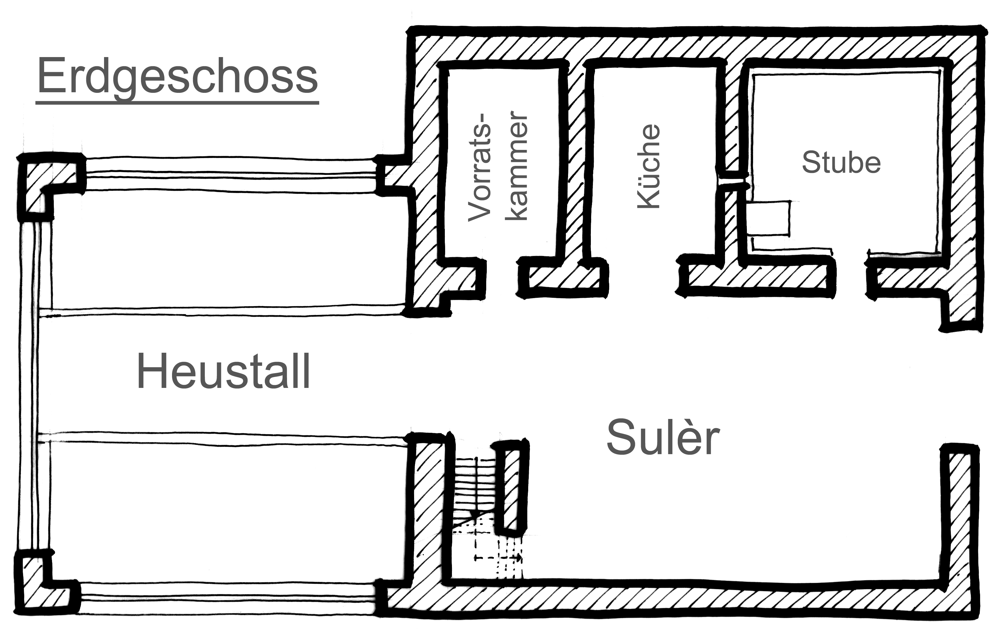 Grundriss des klassischen Engadiner Bauernhauses im Erdgeschoss